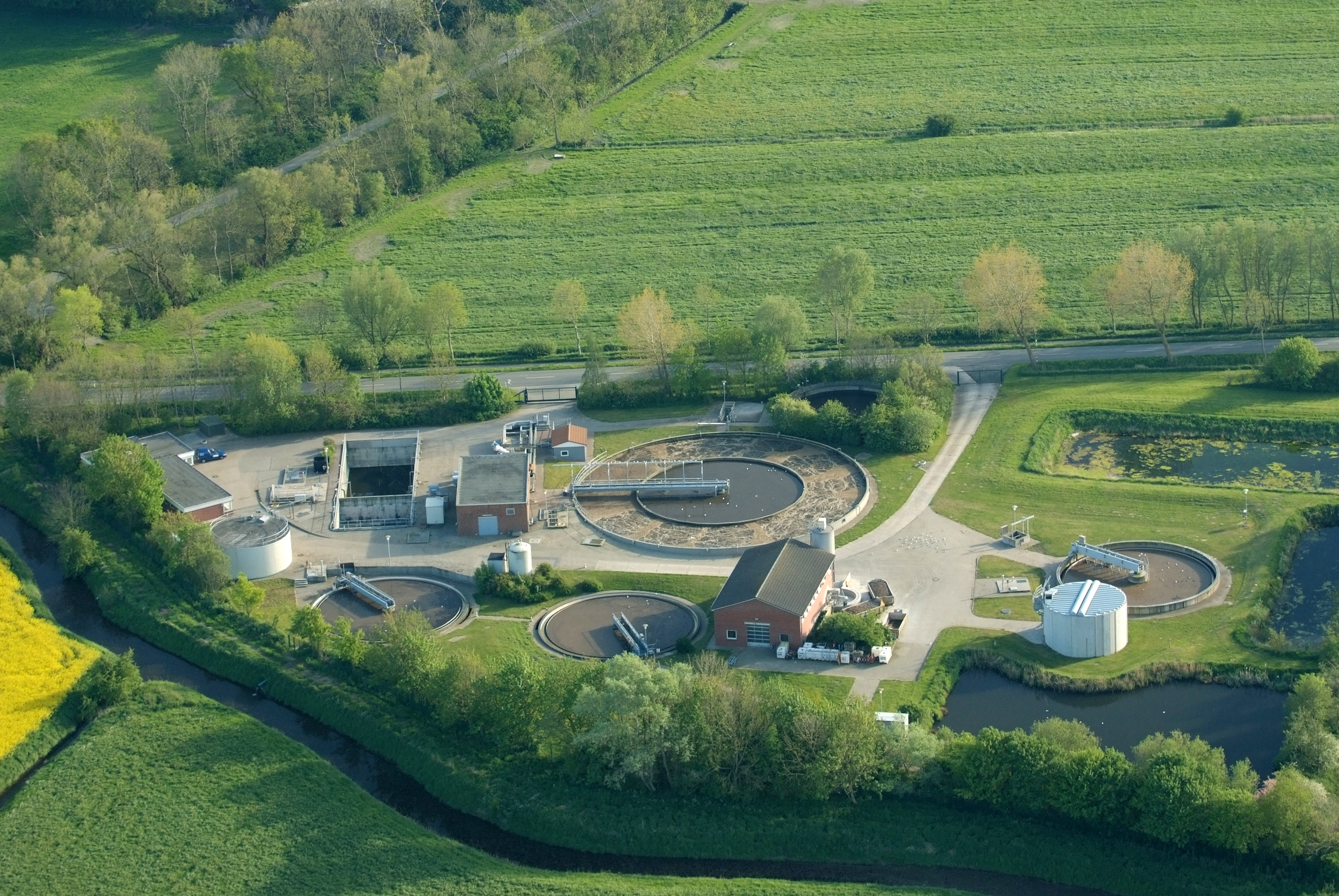 Kläranlage bei Cappel-Neufeld. Fotoflug vom Flugplatz Nordholz-Spieka über Bremerhaven, Wilhelmshaven und die Ostfriesischen Inseln bis Borkum